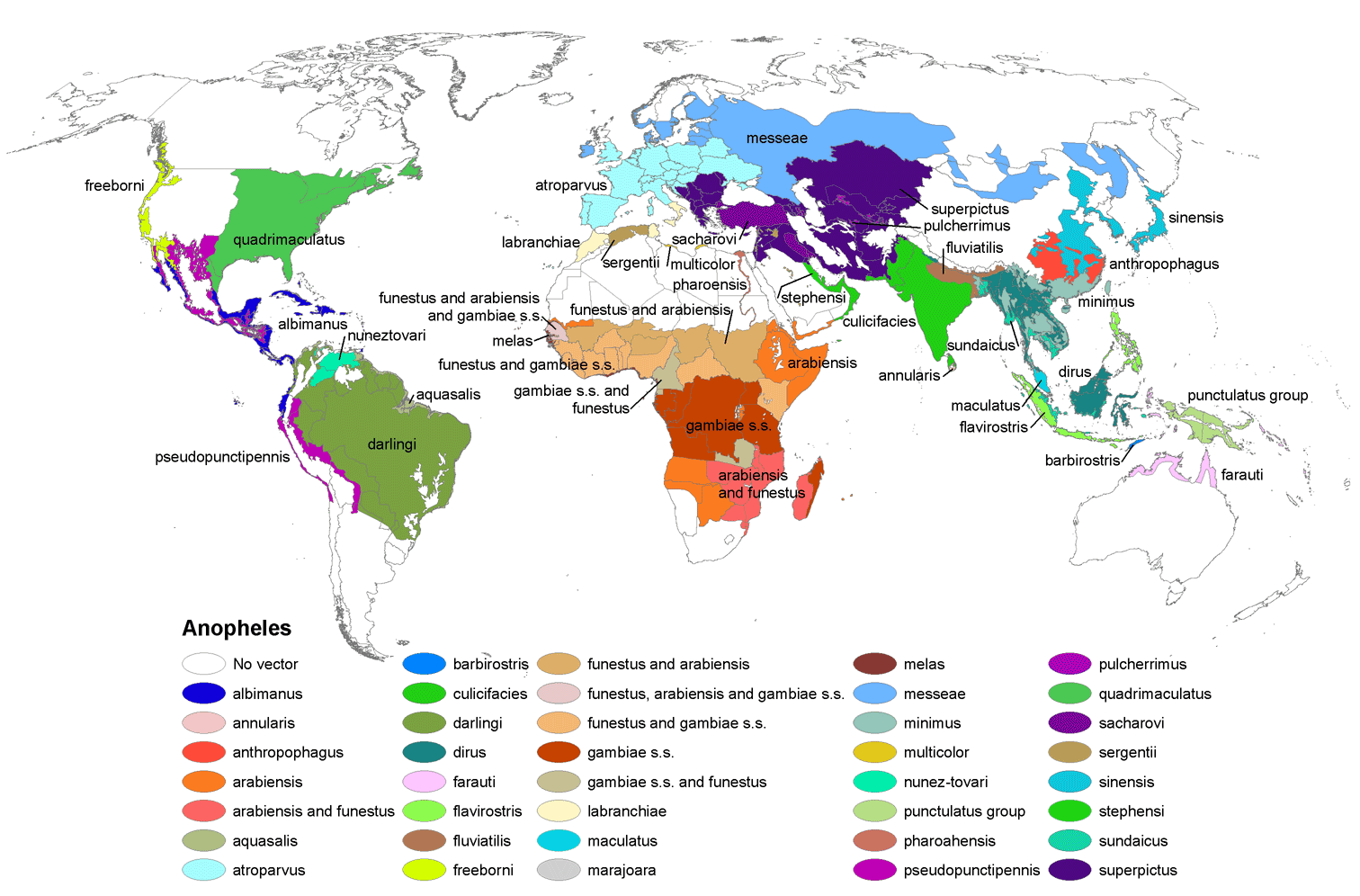 Anopheles mosquito range map